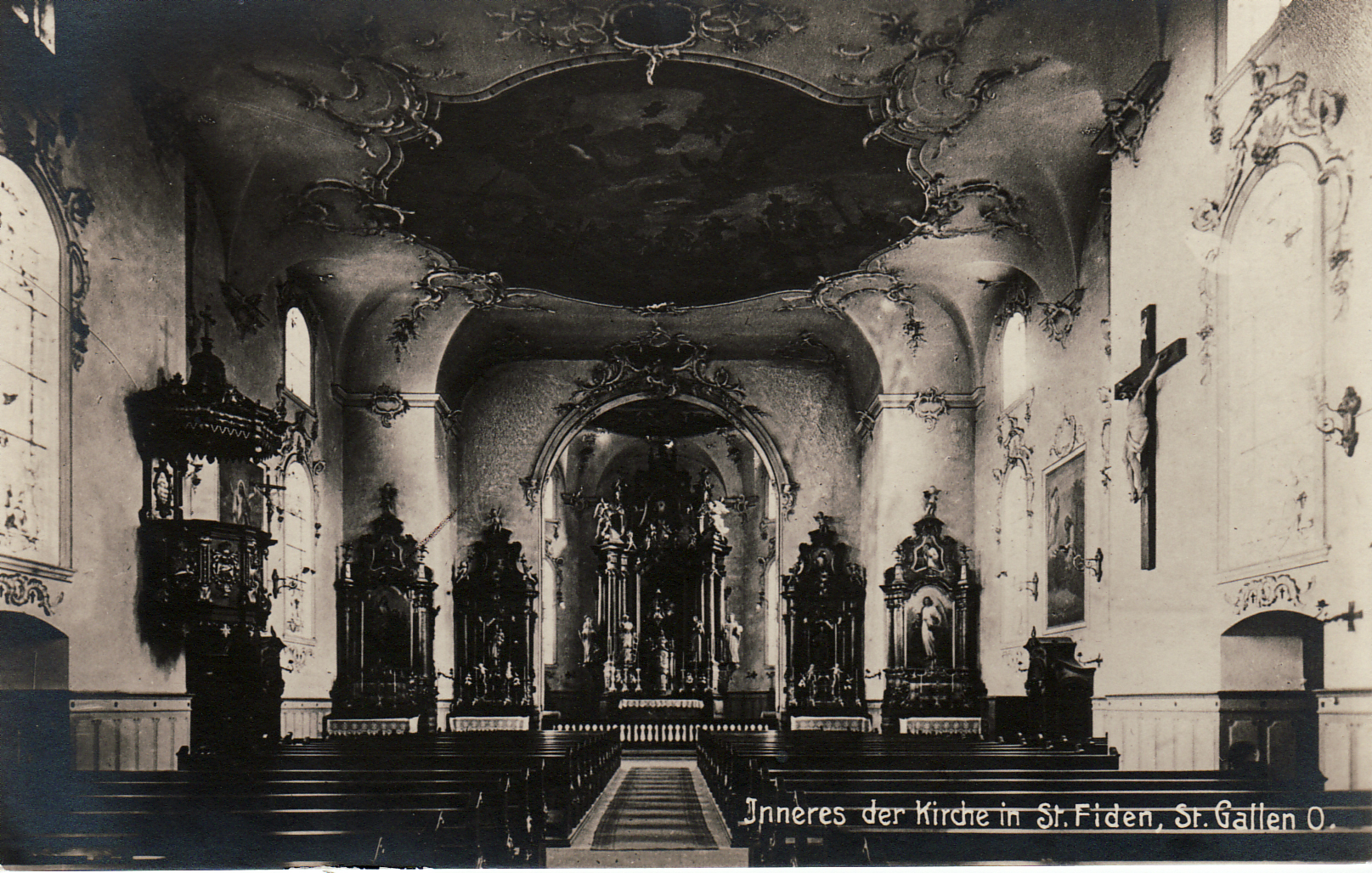 St.Fiden, kath. Kirche, Greithstrasse 5 enthält:erbaut 1776 bis 1778 von Ferdinand Beer; Innenansicht